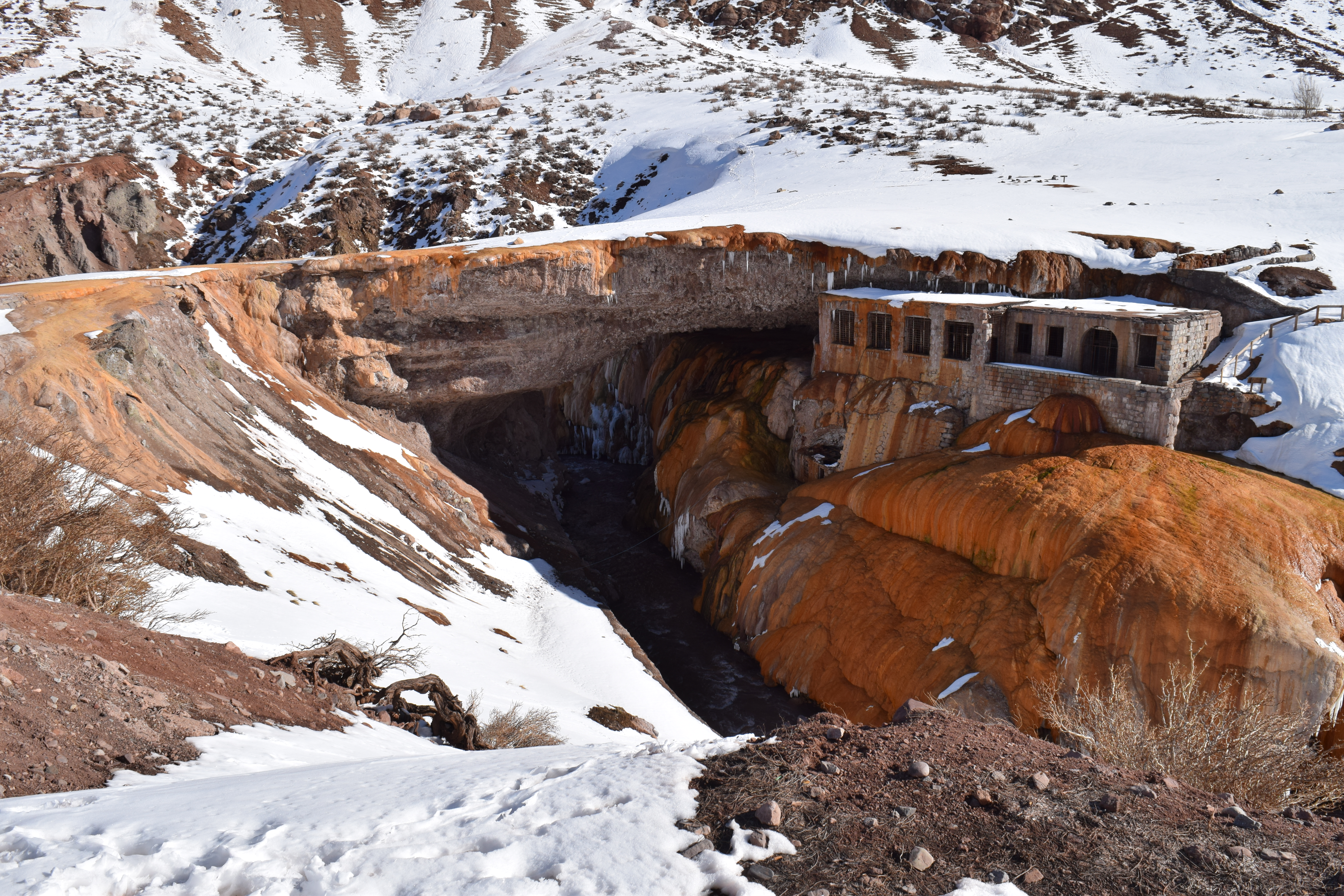 Puente del Inca con nieve.